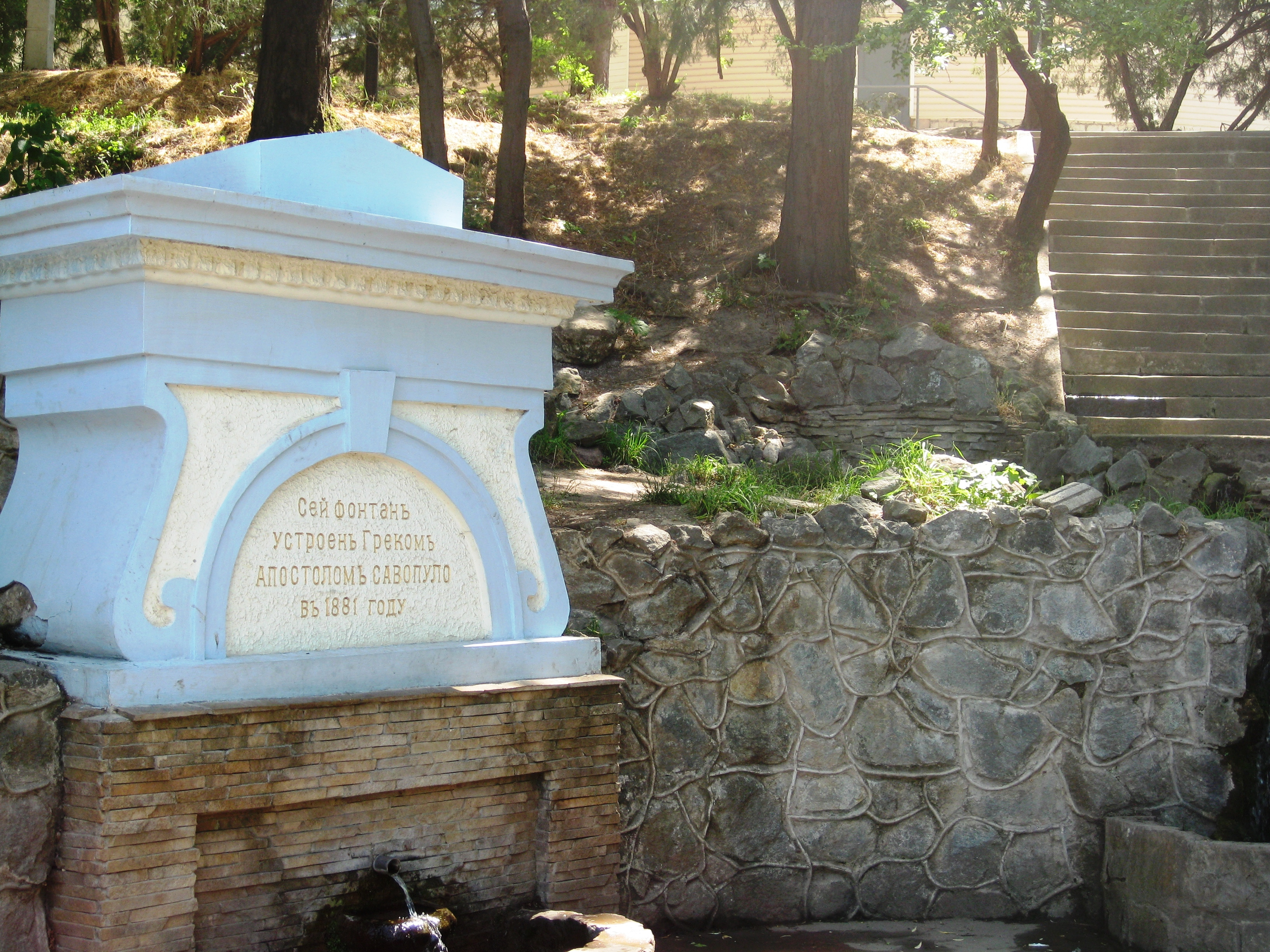 Фонтан А.Савопуло, Сімферополь, пр. Кірова, міський парк культури та відпочинку (з боку Набережної)